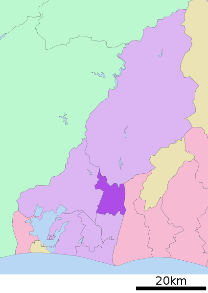 Location Map of Hamakita-ku, Hamamatsu